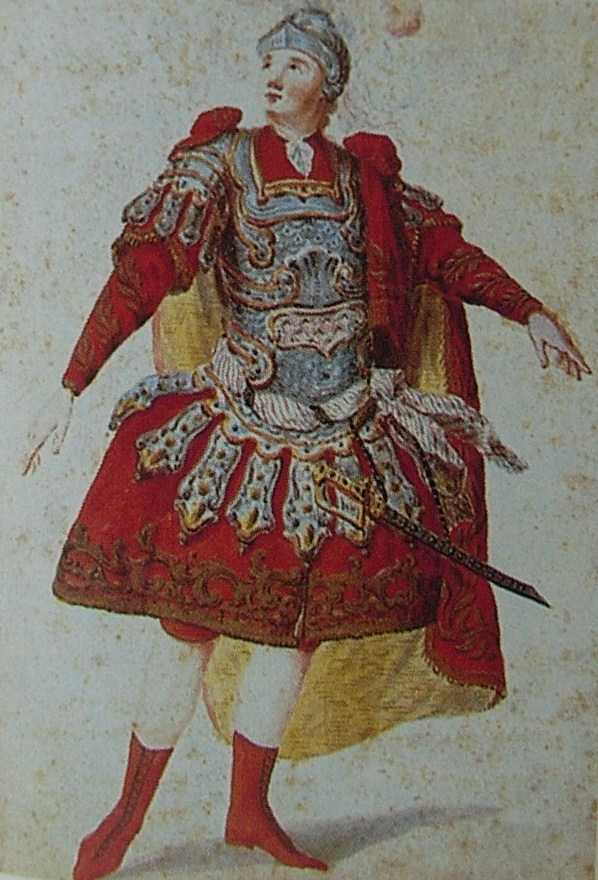 Anton Raaff als Titelfigur des Idomeneo in der Uraufführung der gleichnamigen Oper